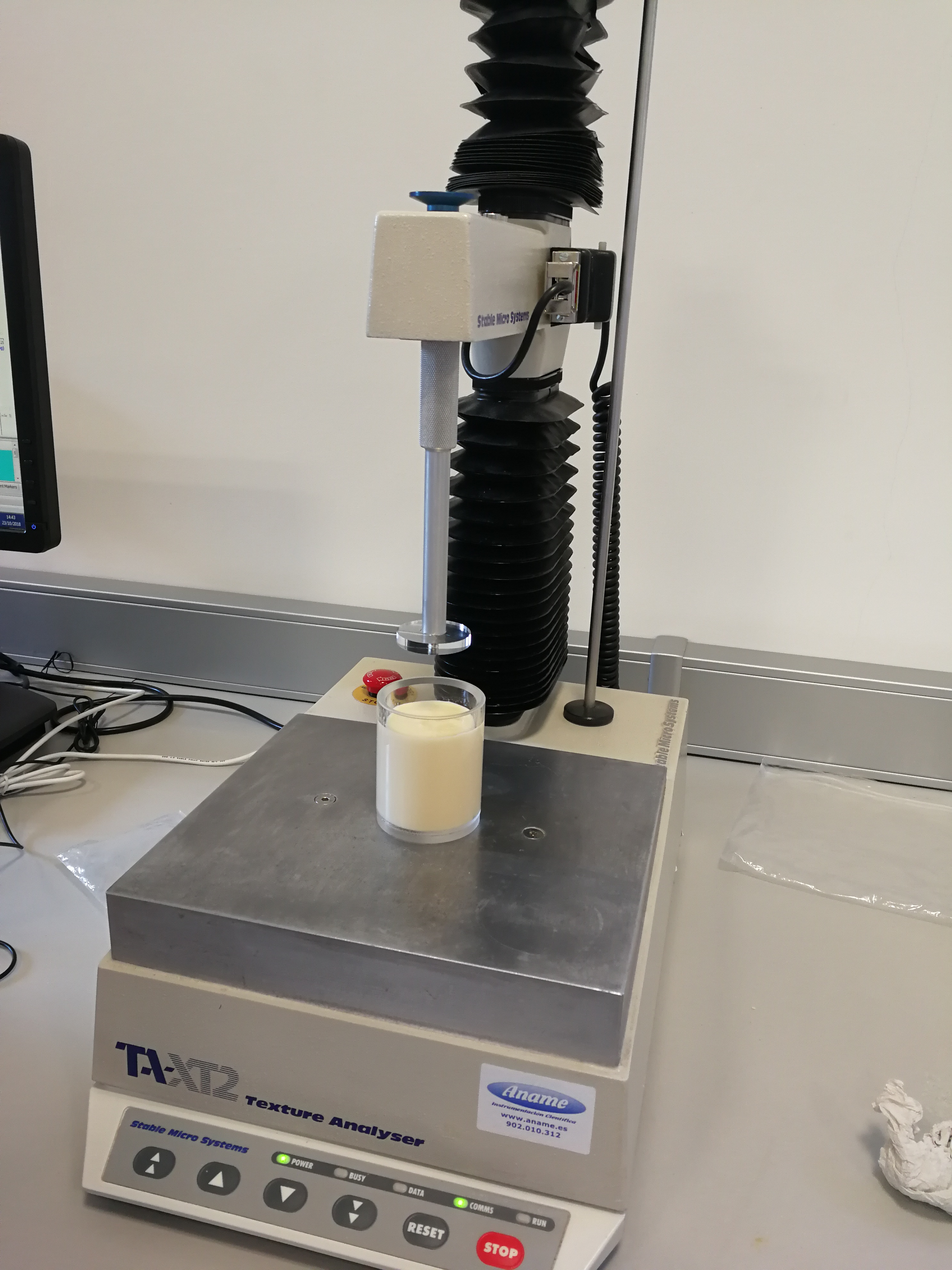 Análisis de la textura de la crema inglesa con el texturómetro